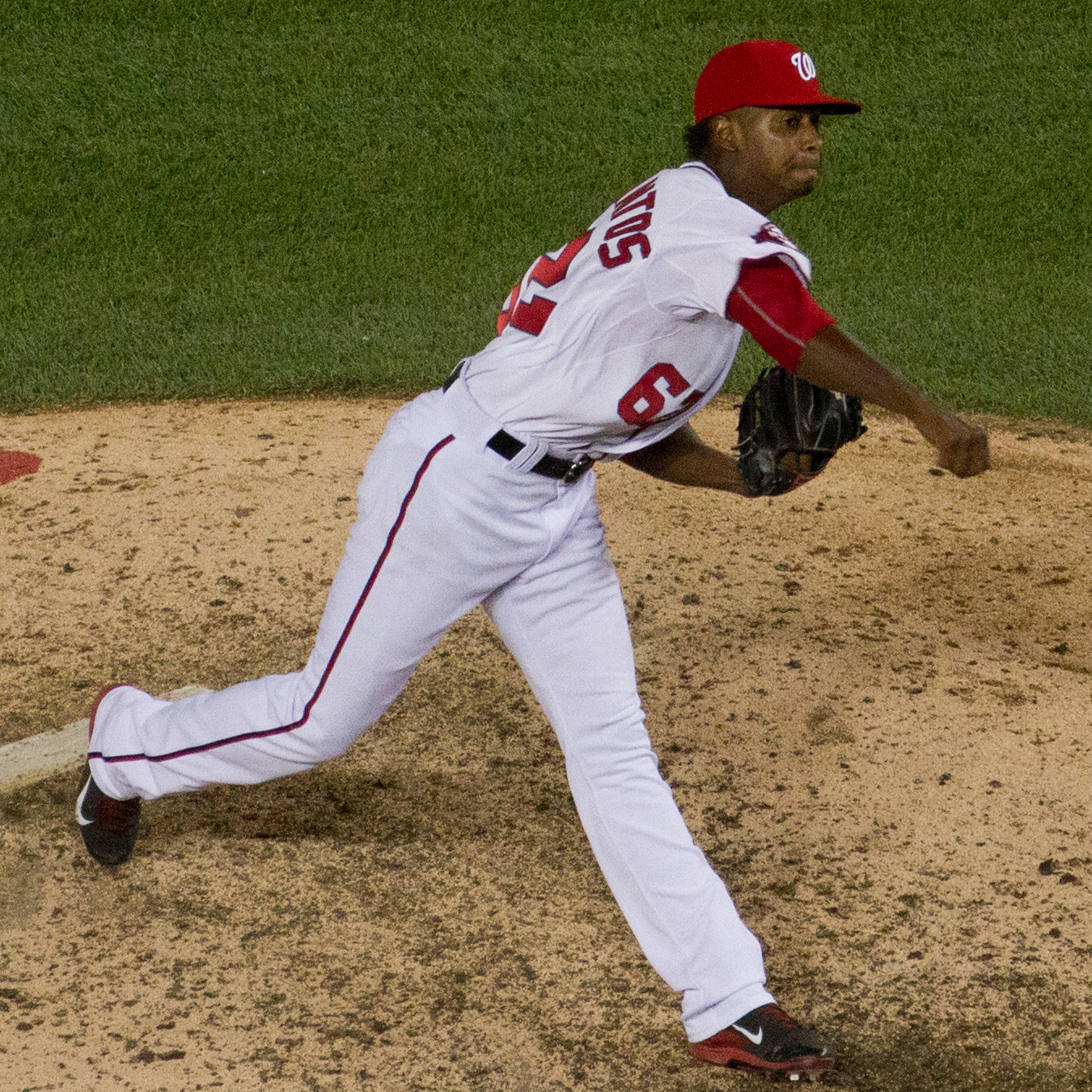 Abel De Los Santos